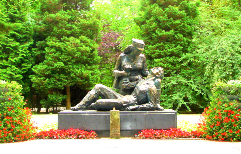 Pomnik Sanitariuszki w Kołobrzegu